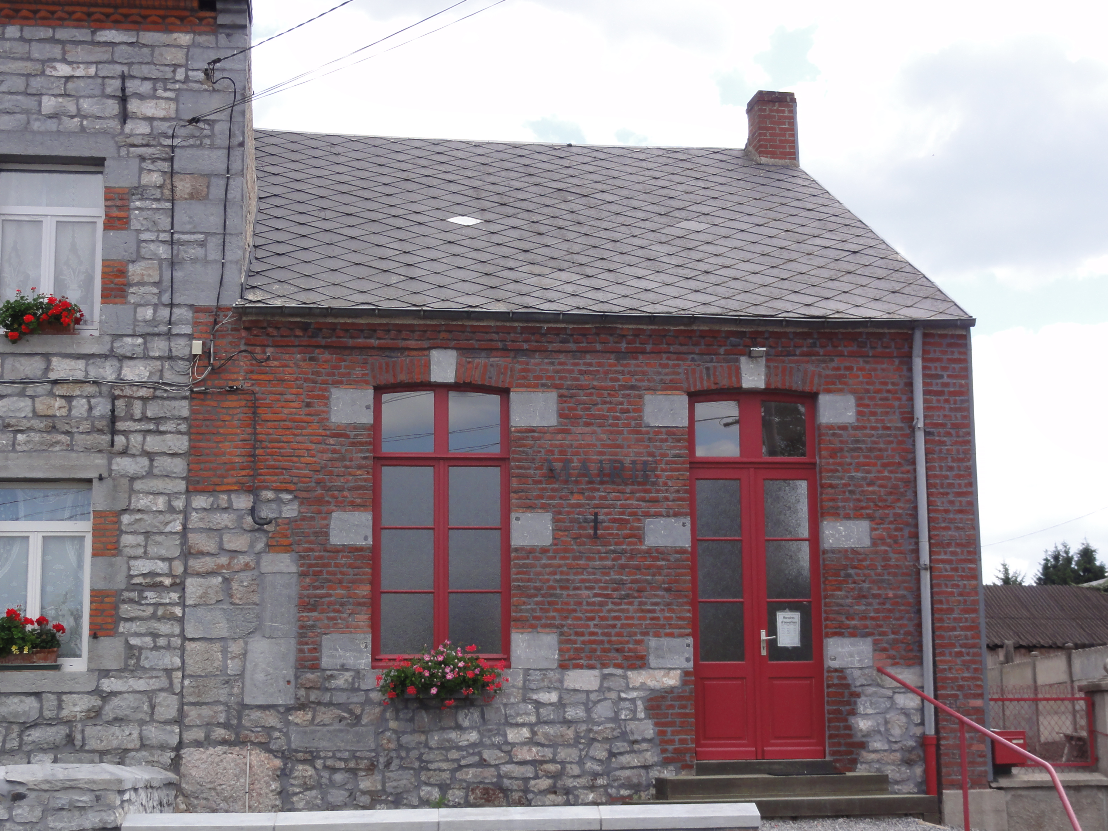 Saint-Aubin (Nord, Fr) mairie